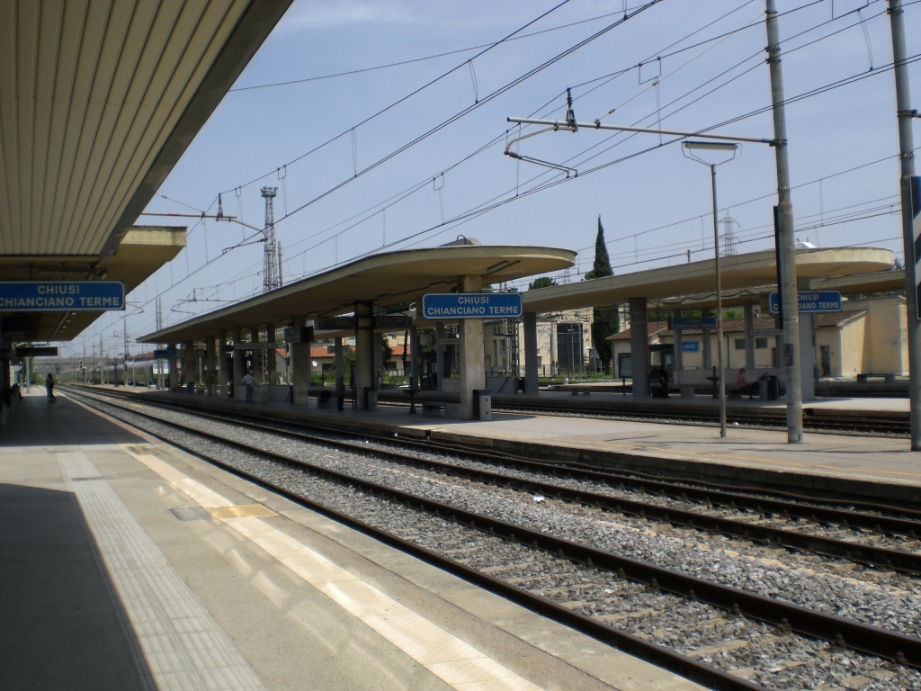 Interno della stazione di Chiusi-Chianciano Terme